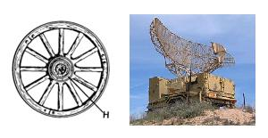 Rebus v slovenščini